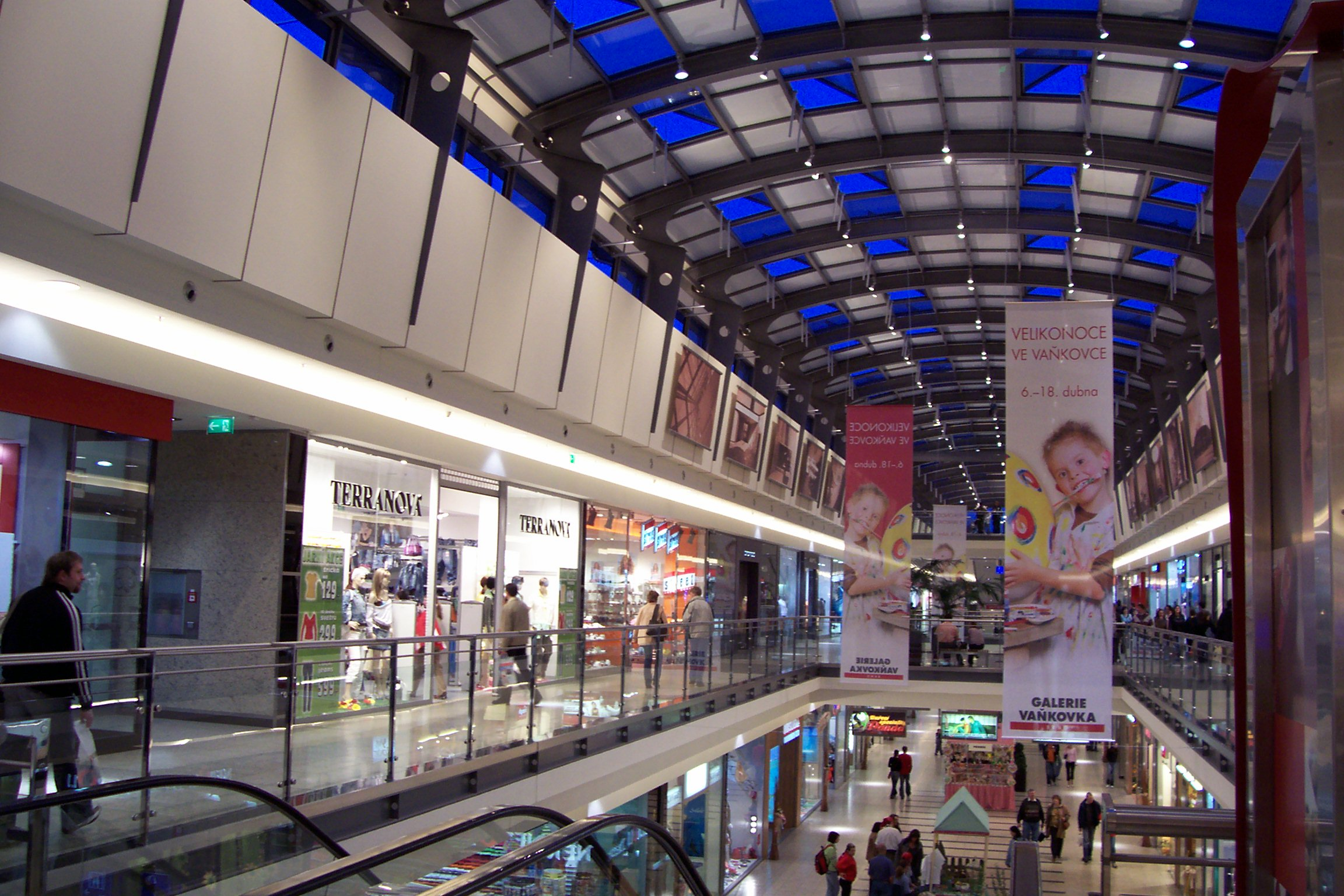 Interiér obchodního centra Vaňkovka